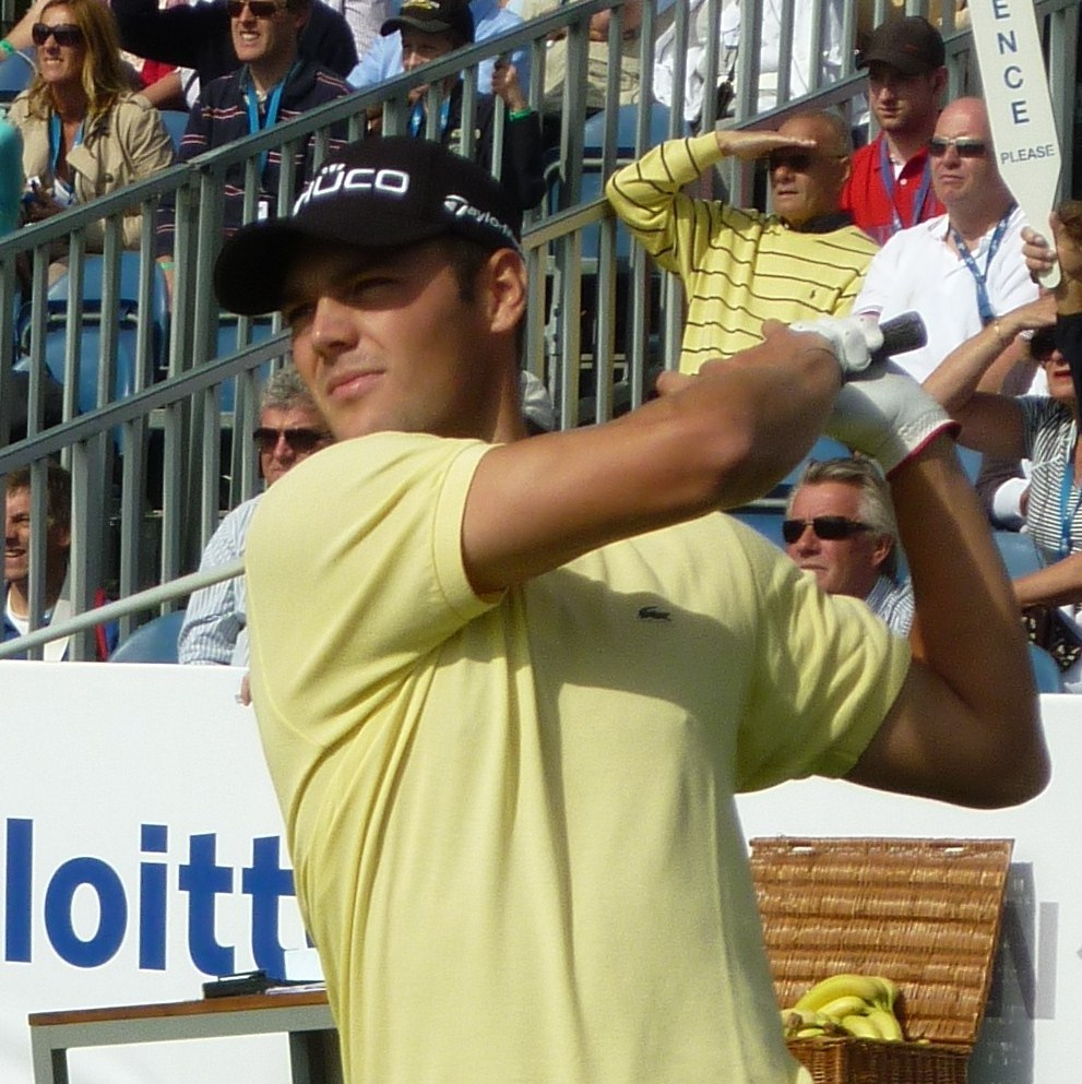 Martin Kaymer KLM_Open_2010